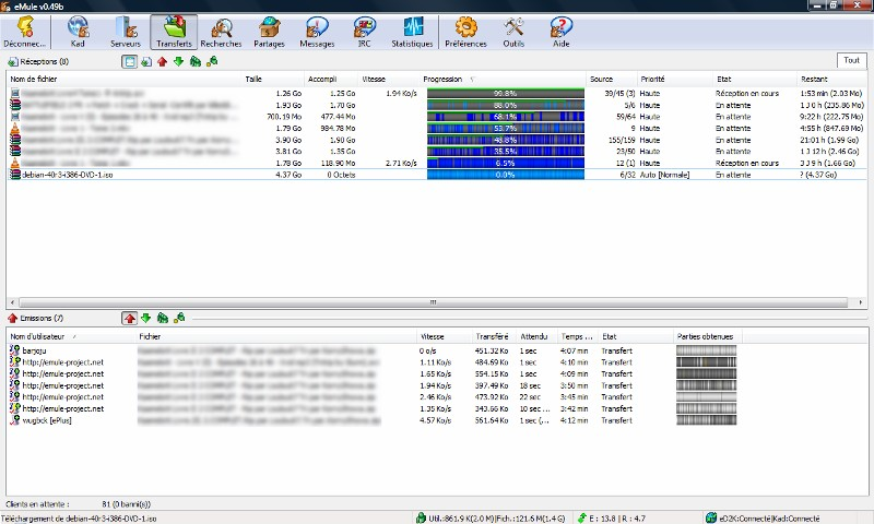 eMule 0.49b sous Windows Vista